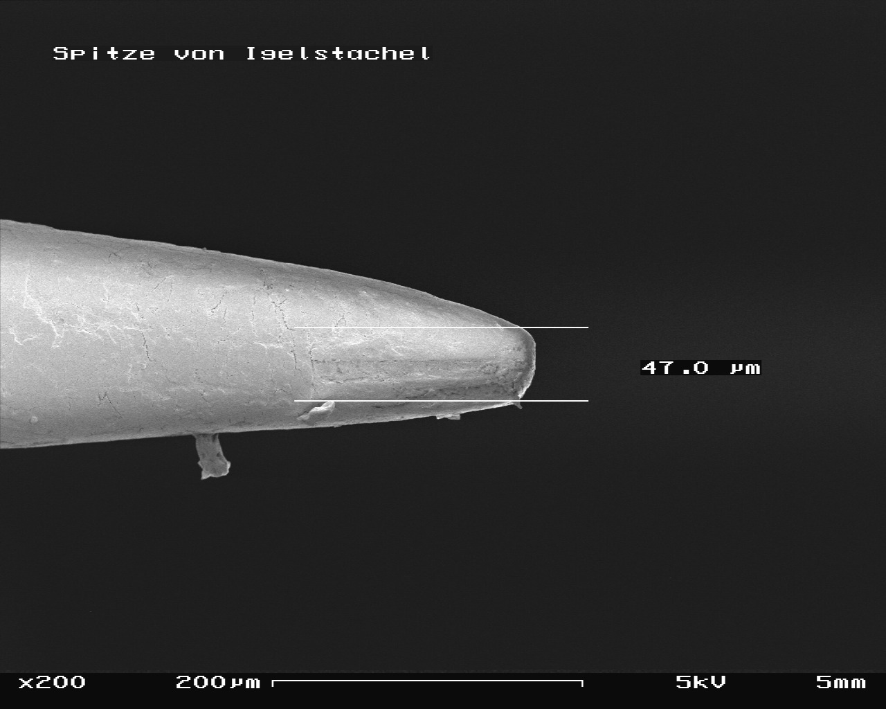 Hedgehog sting in SEM, 200x